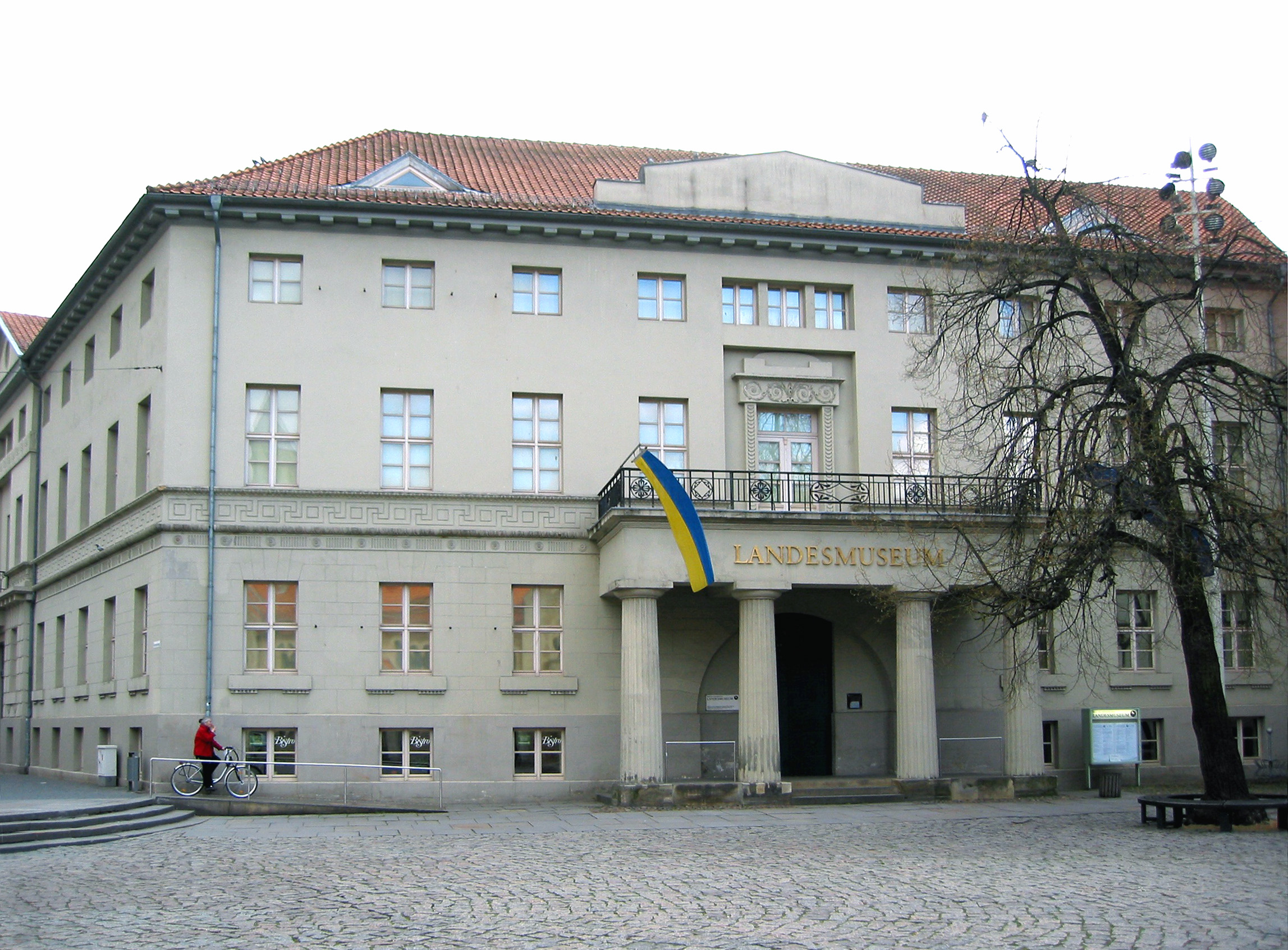 Braunschweig, Landesmuseum